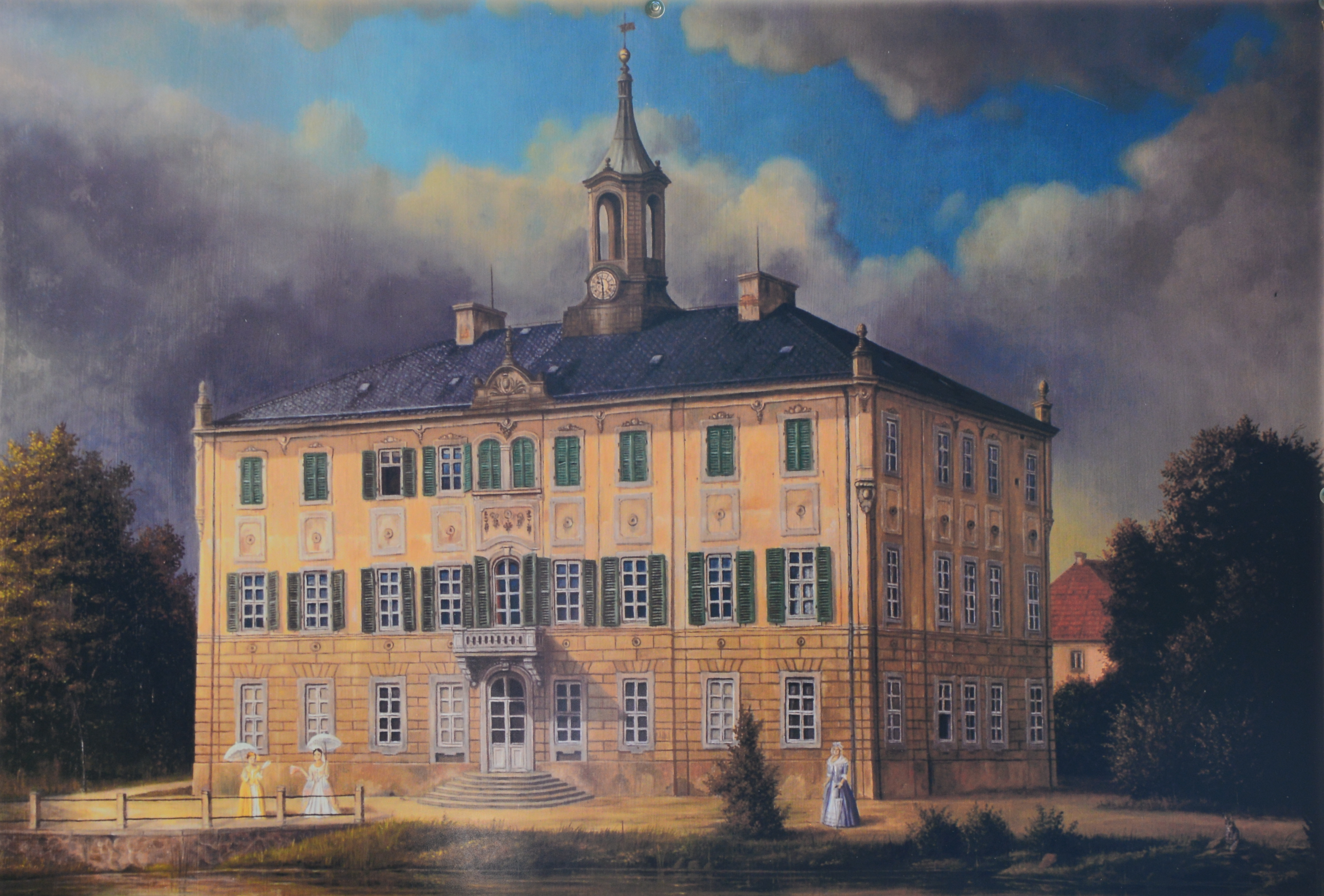 Schloss Lauterbach im Landkreis Meißen, Mai 2017, Mauernische eines ehemaligen Laubenganges mit Schlossbild von Roland Schwenke.